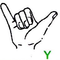 Der Buchstabe Y im deutschen Fingeralphabet, entsprechend einer Infokarte des Landesverbandes Bayern der Gehörlosen e.V. (